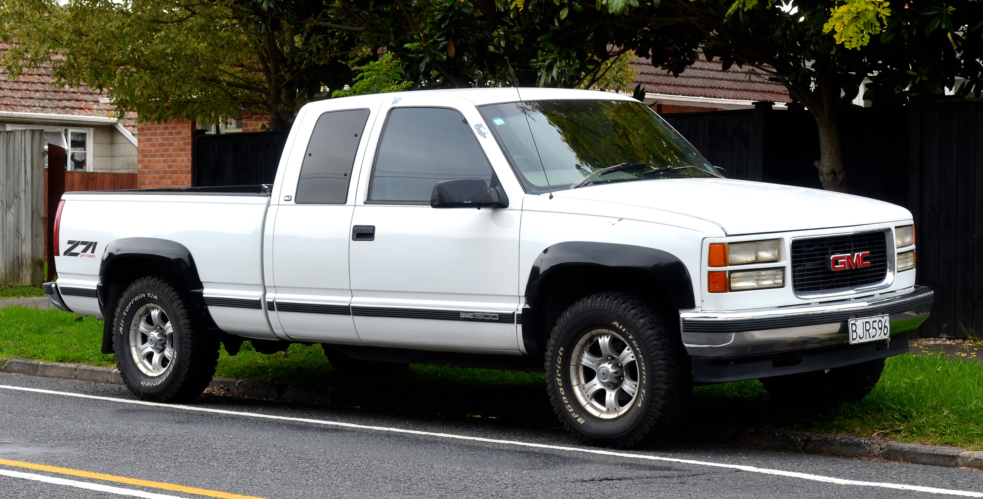 Auckland New Zealand